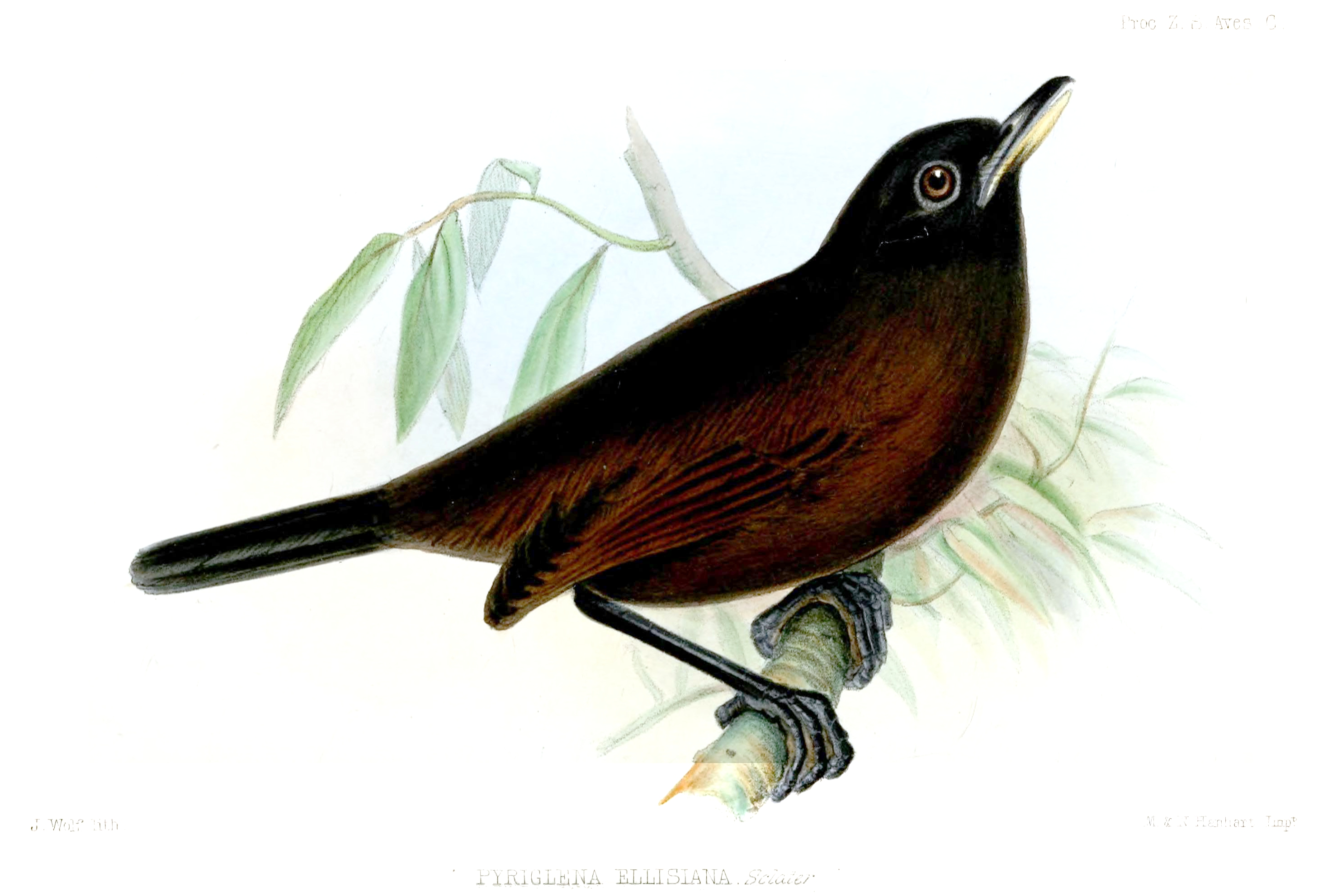 Pyriglena ellisiana=Myrmeciza immaculata